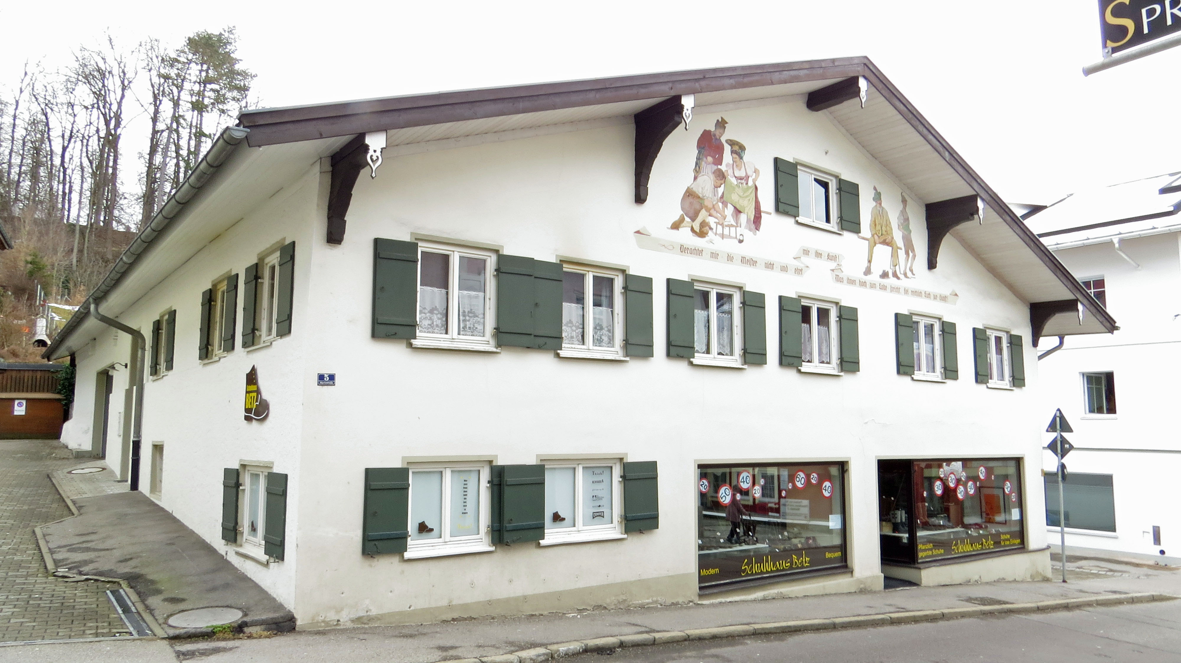 Marktstr. 5 in Sonthofen